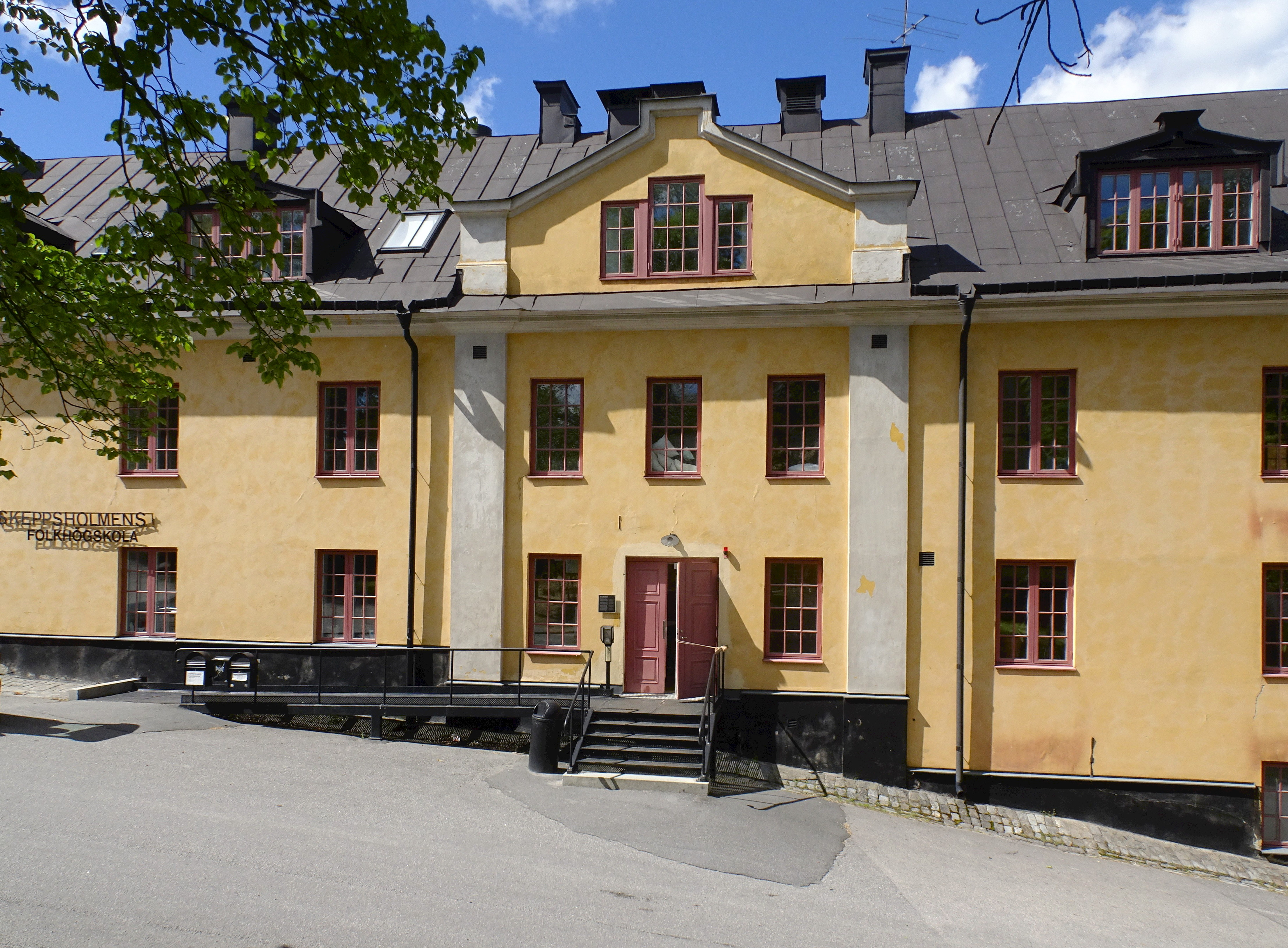 Norra och Södra fundamentet, Skeppsholmens Folkhögskola, huvudentré "Södra fundamentet"